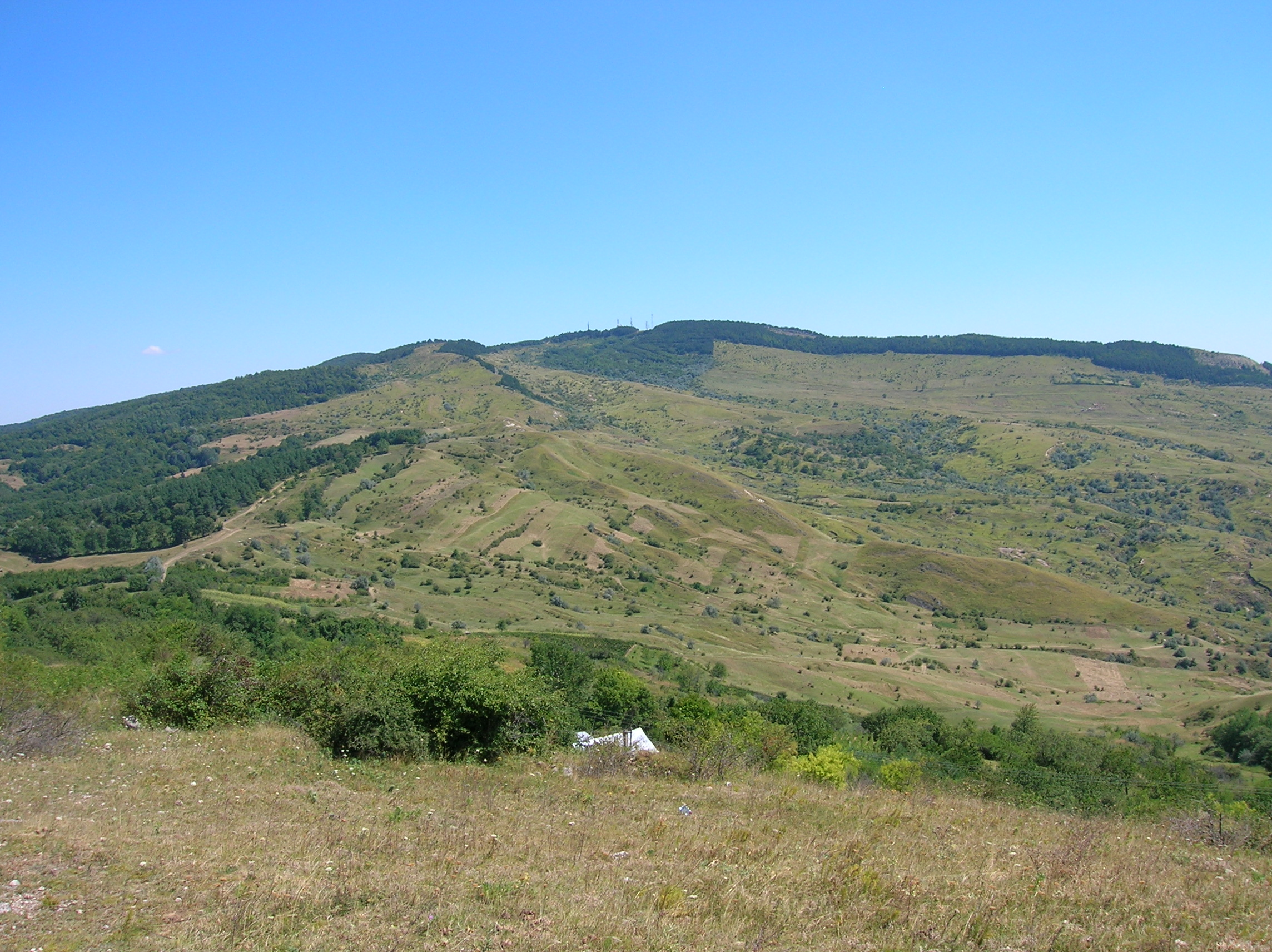 Dealul Istrița, județul Buzău, România: de lângă Biserica dintr-o piatră spre zona somitală